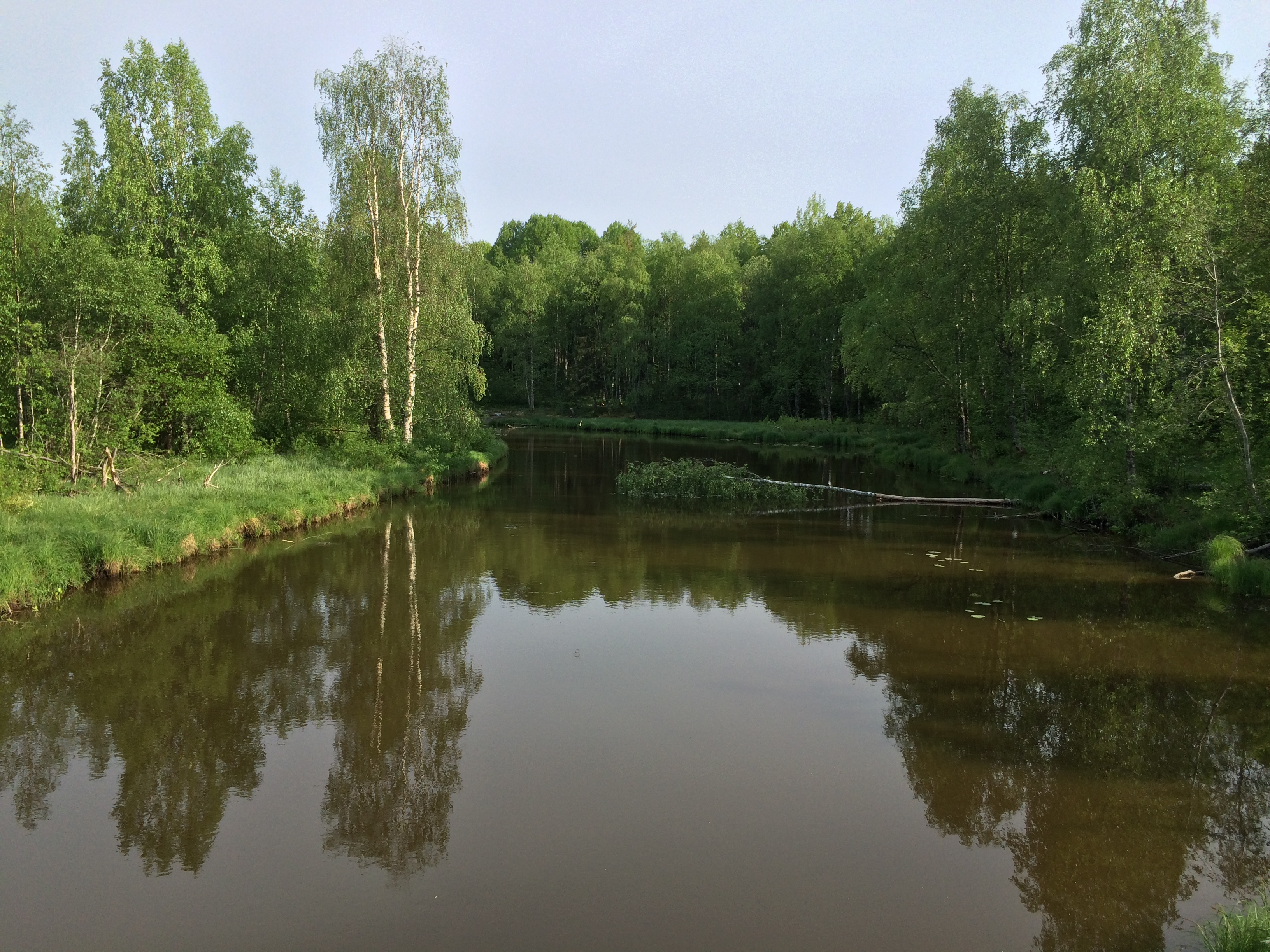 Миккильская